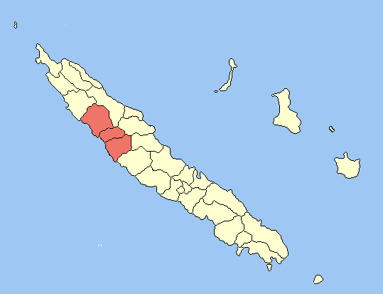 Carte administrative de la Nouvelle-Calédonie, montrant colorées les trois communes formant la zone VKP : Voh, Koné, Poouembout. Le fichier est dérivé de